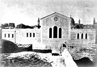 Александровское подворье в Иерусалиме. Фото 19 века